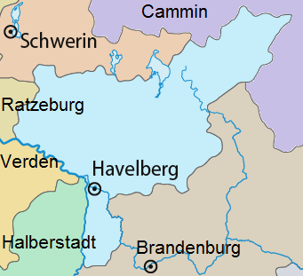 Bistum Havelberg vor der Reformation (Diözesangrenzen)